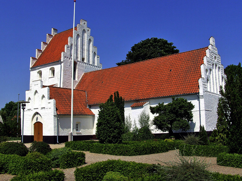 set fra sydøst